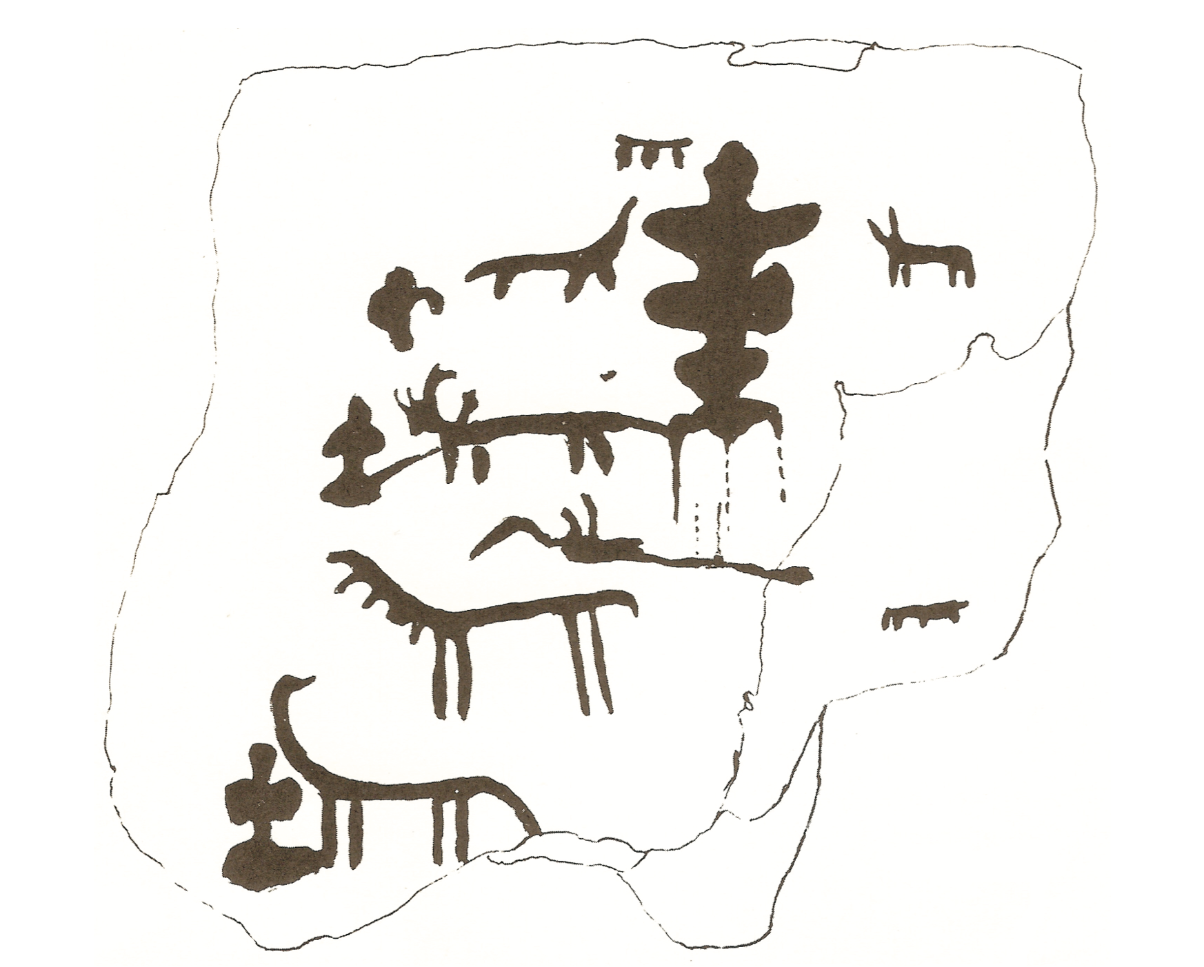 Disegno delle pitture rupestri di "Riparo Ranaldi" in Tuppo dei Sassi, eseguito dal prof. Francesco Ranaldi